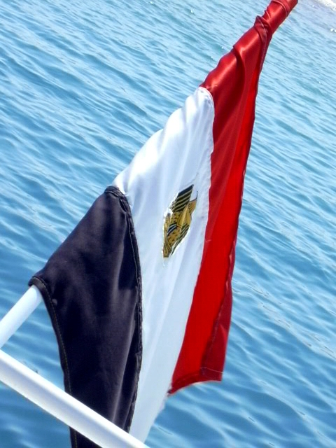 Egyptian flag